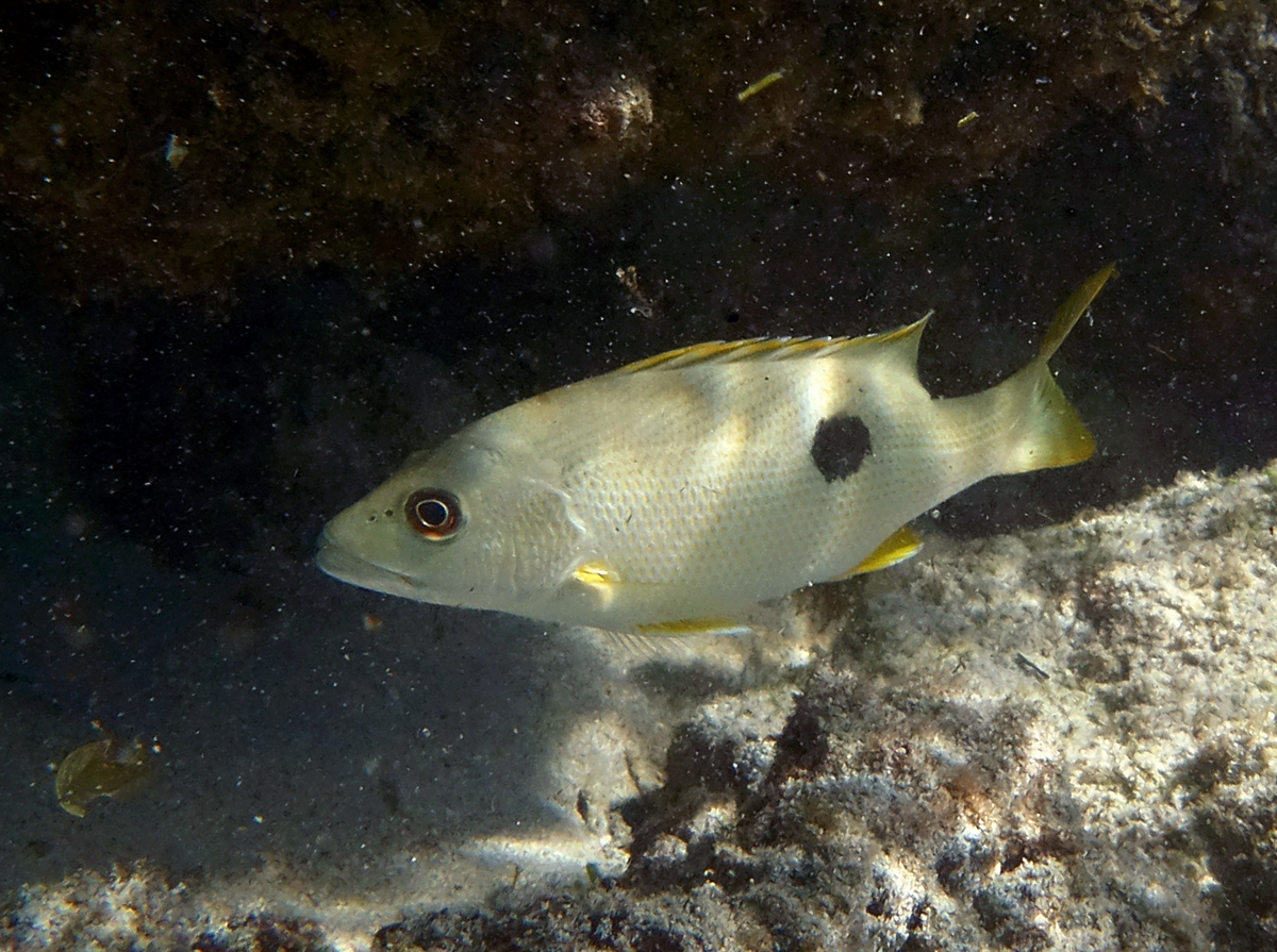 Un vivaneau à tache noire (Lutjanus monostigma) à la Réunion.